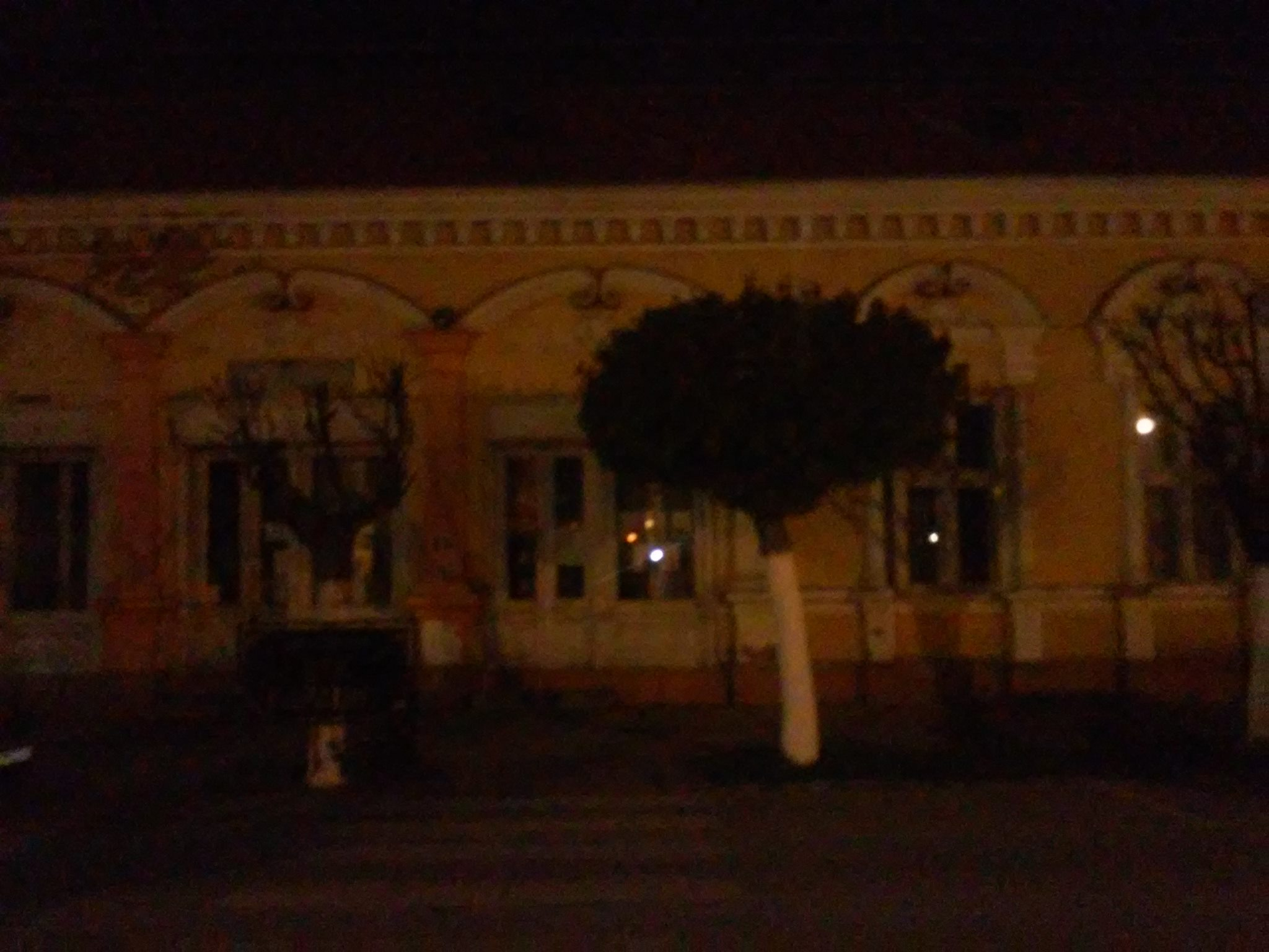 Srpskohrvatski / српскохрватски: Veliko Gradište biblioteka